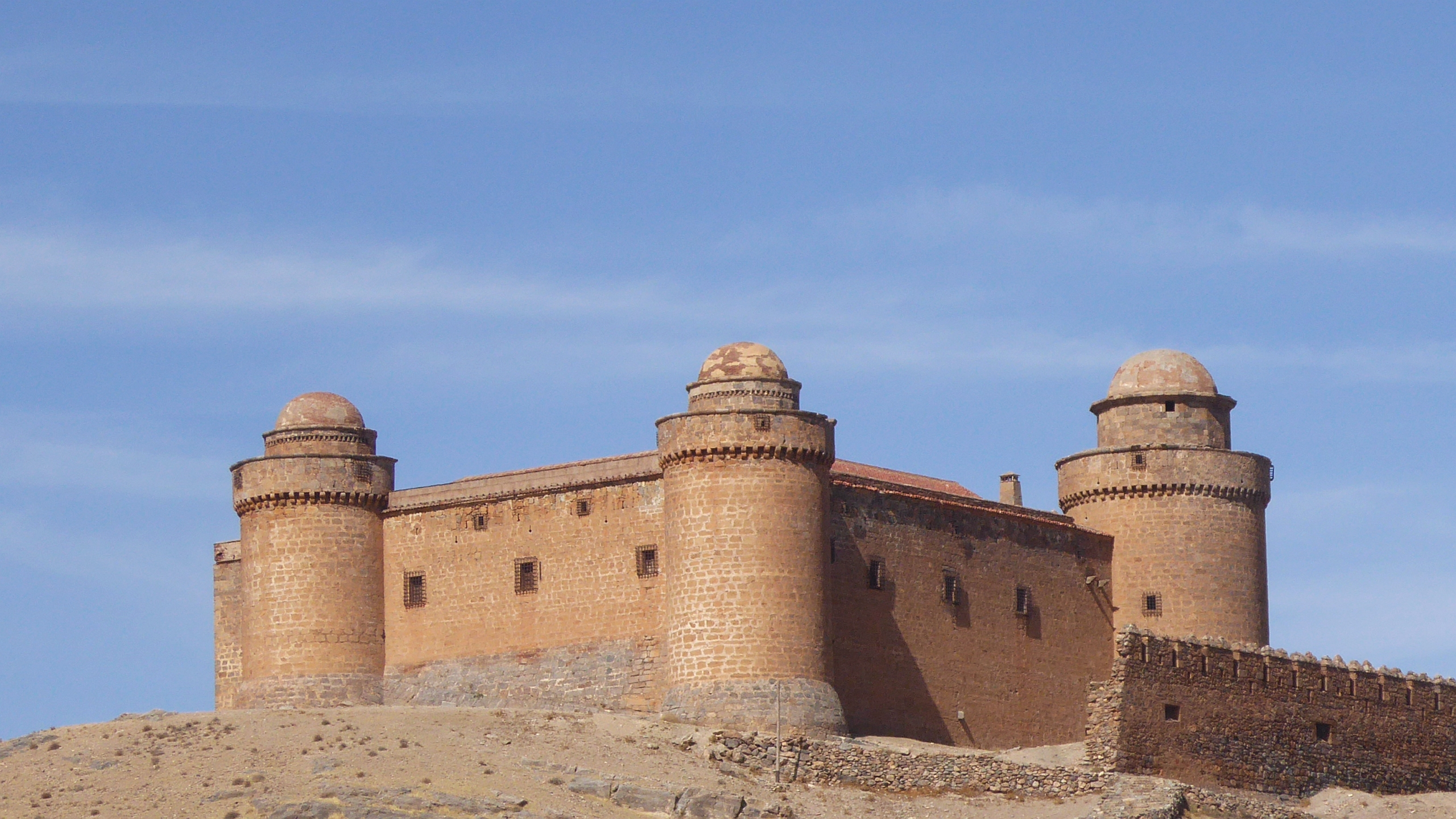 Castillo de La Calahorra 16. Jh Monumento in Privatbesitz nördlich span Sierra Nevada Andalusien Spanien Foto Wolfgang Pehlemann P1110082.jpg